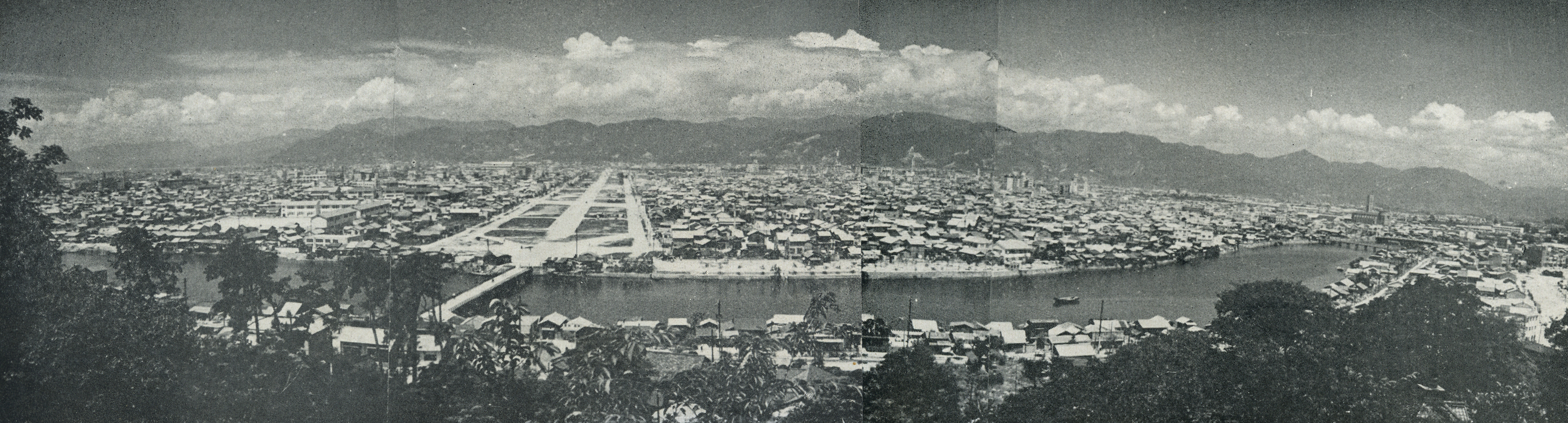 1955年の比治山から広島市内を望む。